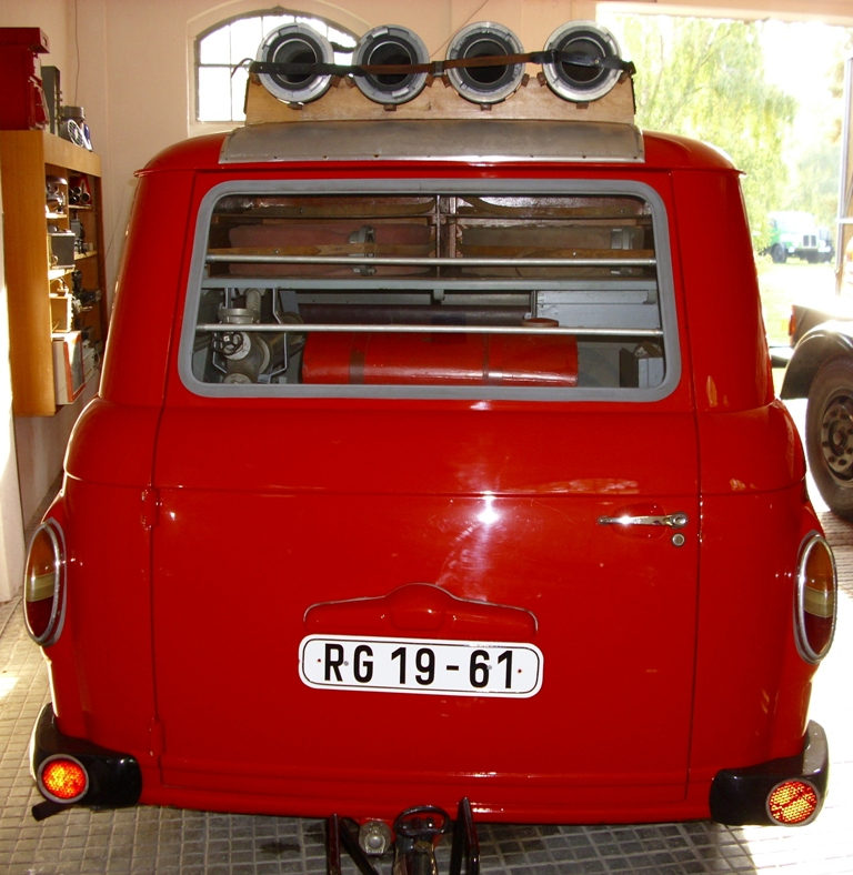 Geräteraum mit Löschgeräten